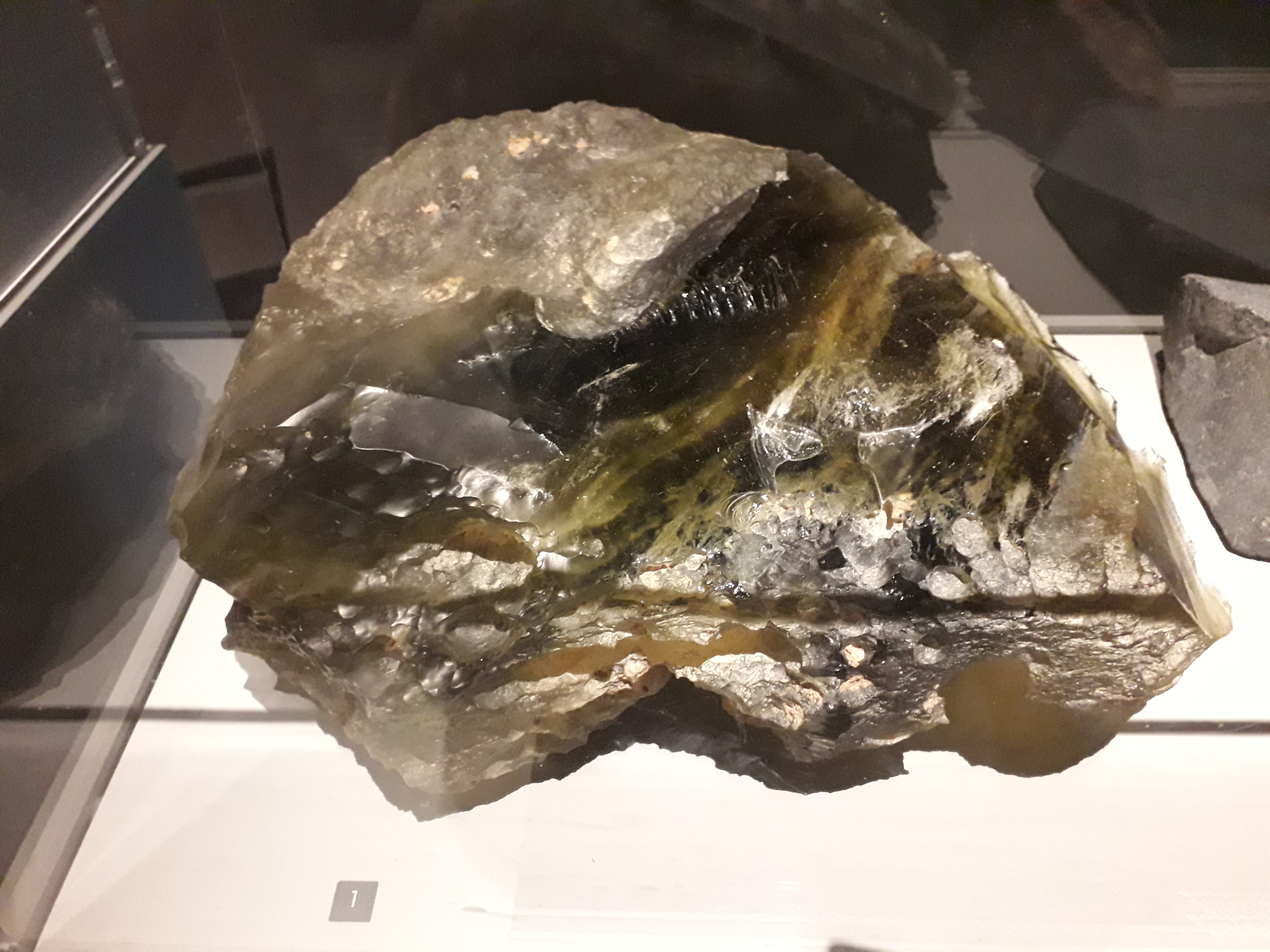 Verre libyque en provenance de la "Grande mer de sable" en Libye et en Egypte. Poids de l'échantillon : 26 kilos. (Date de découverte non précisée, probablement XXe siècle ou début du XXIe siècle.) Ce verre a probablement été formé par l'explosion d'un bolide extra-terrestre dont l'onde de choc a vitrifié le sable environnant le point d'impact. Cet impact aurait eu lieu il y a 28 millions d'années. Cet échantillon de 26 kilos est le plus gros connu. Exposé à l'exposition "Météorites, entre ciel et terre", dans le bâtiment de la Grande galerie de l'évolution, au Muséum national d'histoire naturelle, à Paris (France), octobre 2017-10 juin 2018.